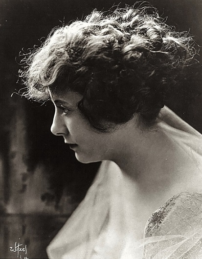 Grace Cunard